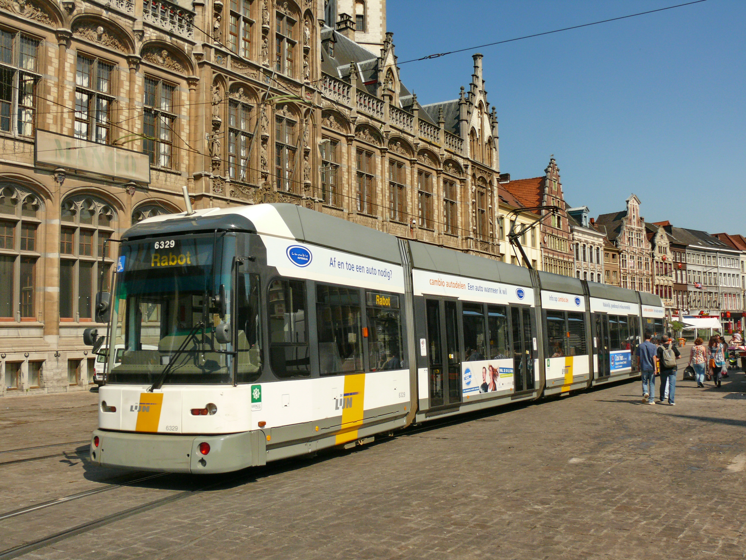 Tramway de Gand - Rame Hermelijn 6329 sur le Korenmarkt